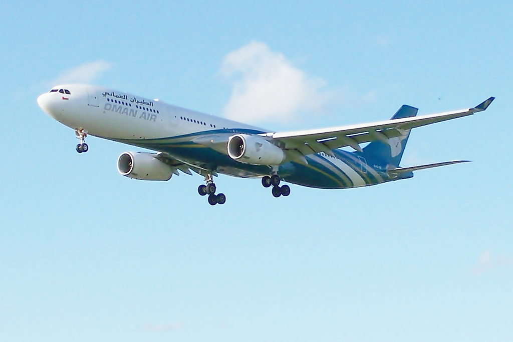 A4O-DE A330 Oman Air